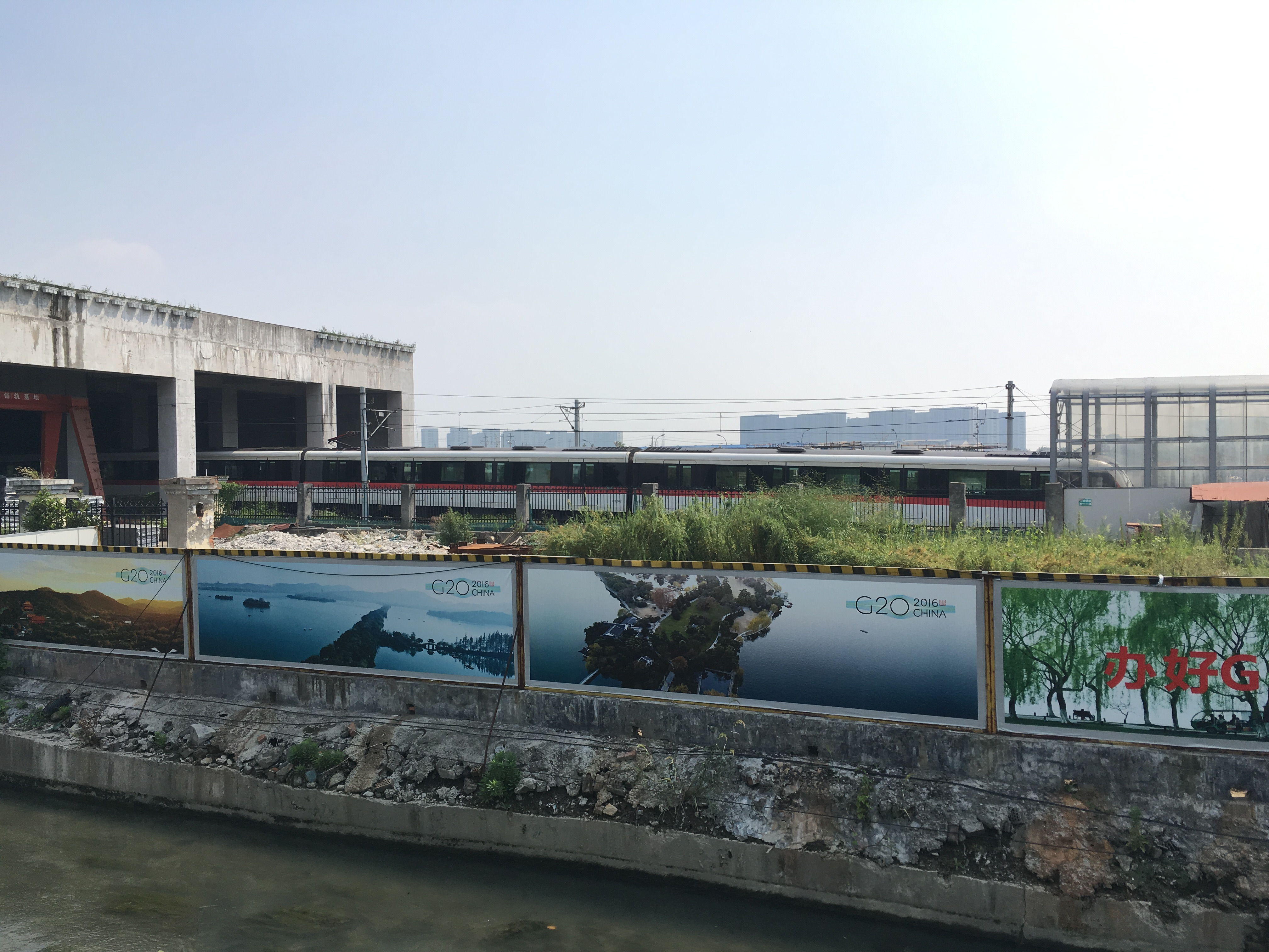 杭州地铁1号线列车出七堡车辆段